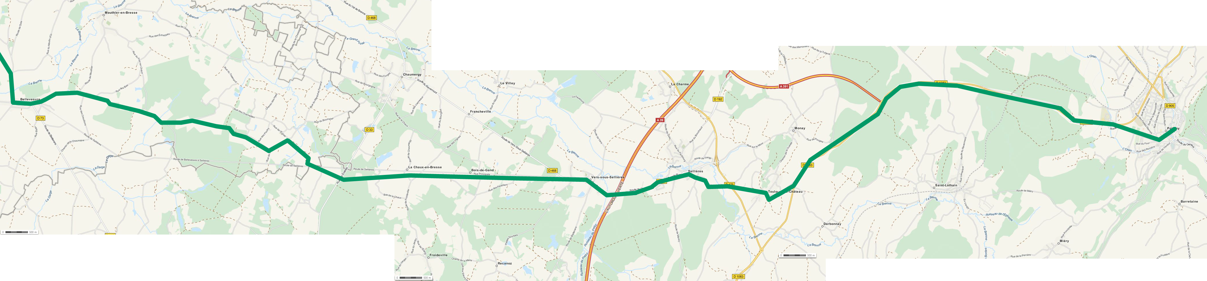 Karte der Römerstrasse von (Autun und) Verdun-sur-le-Doubs nach Poligny - Teilstück Bellevesvre bis Poligny Carte de la voie romaine de (Autun et) Verdun-sur-le-Doubs à Poligny - Partie entre Bellevesvre et Poligny This map may be incomplete, and may contain errors. Don't rely solely on it for navigation.